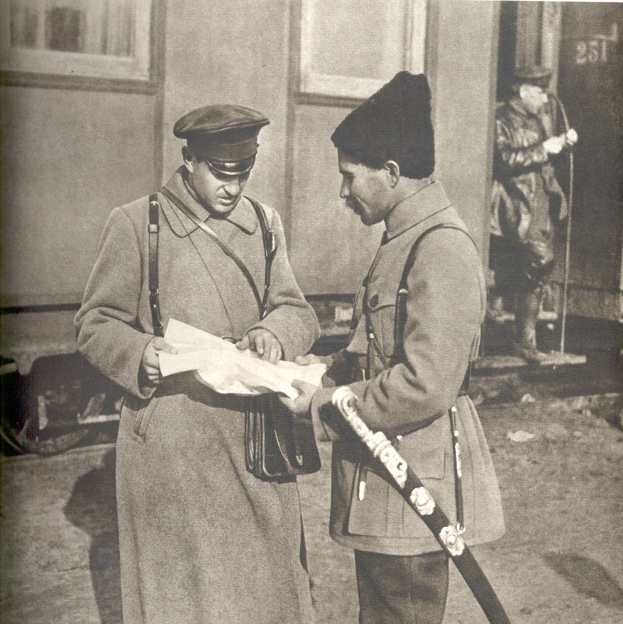 Сергей Парменович Захаров — командир 1-й Николаевской дивизии и Василий Иванович Чапаев — командир 2-й Николаевской дивизии